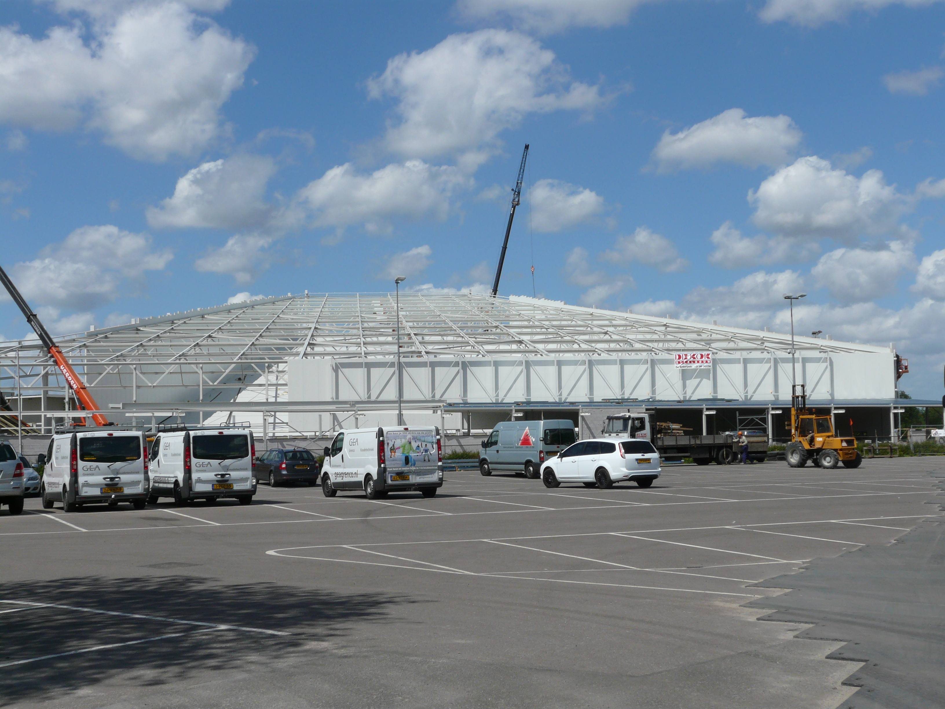 Uitbreding Skidome in Rucphen